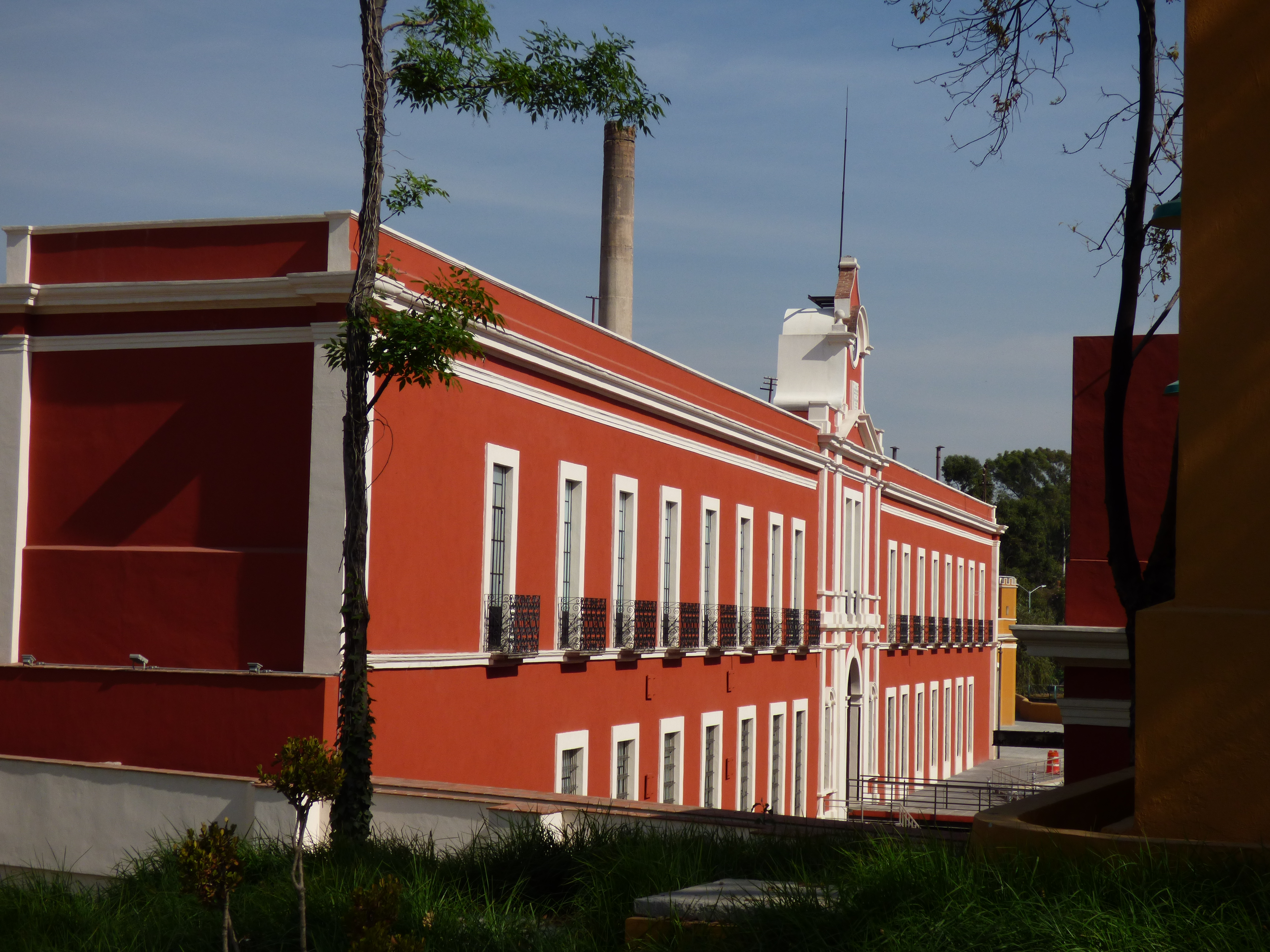 La Constancia Mexicana, actual Museo de la música y el títere, Puebla, México